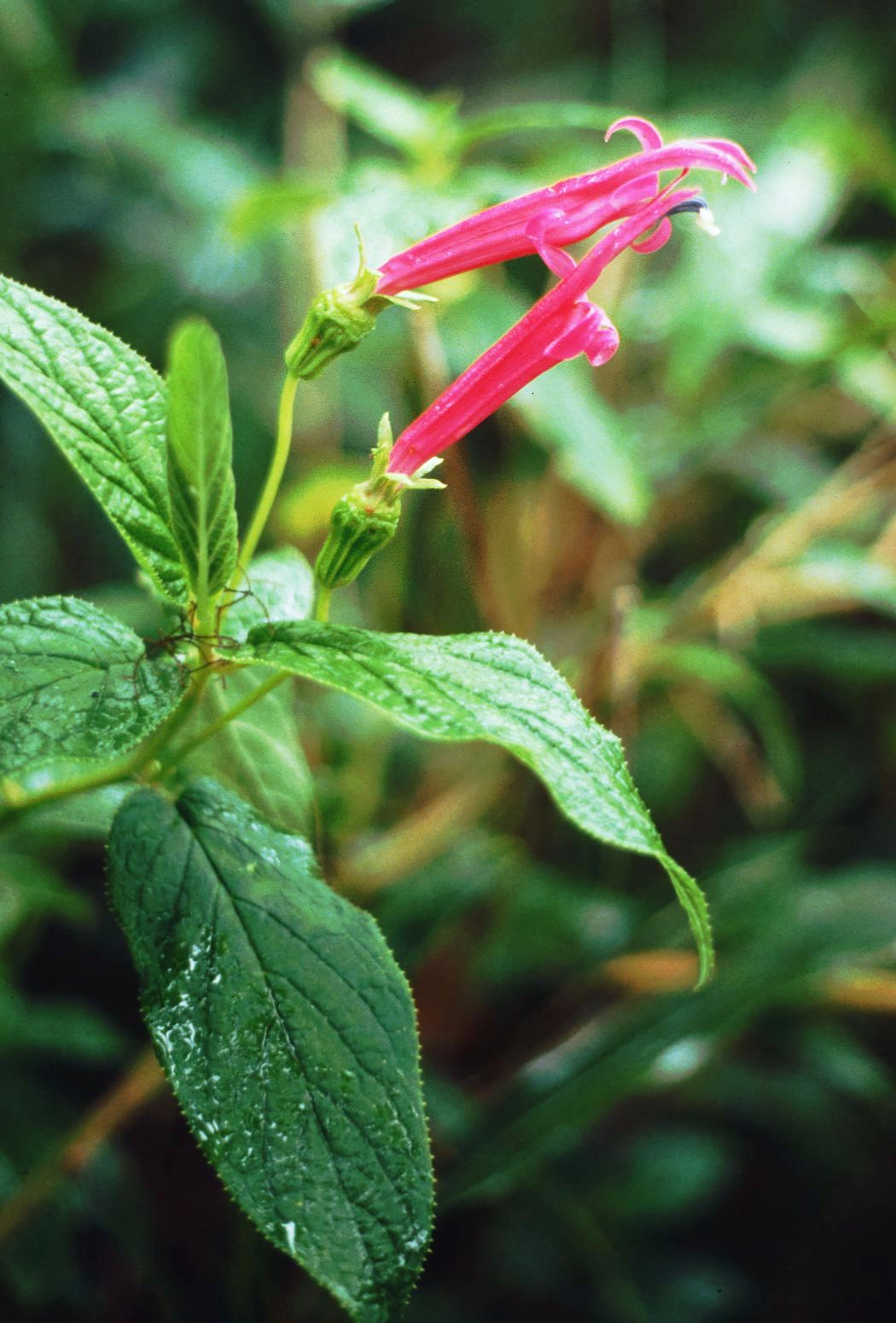 Centropogon talamancensis, Glockenblumengewächse (Campanulaceae) - Costa Rica: Prov. San José, Cordillera de Talamanca, Carretera Interamericana, La Georgina